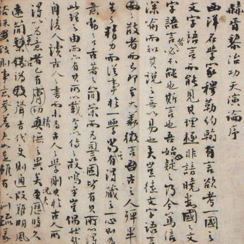 中文（中国大陆）: 赫胥黎《天演论》--严复译